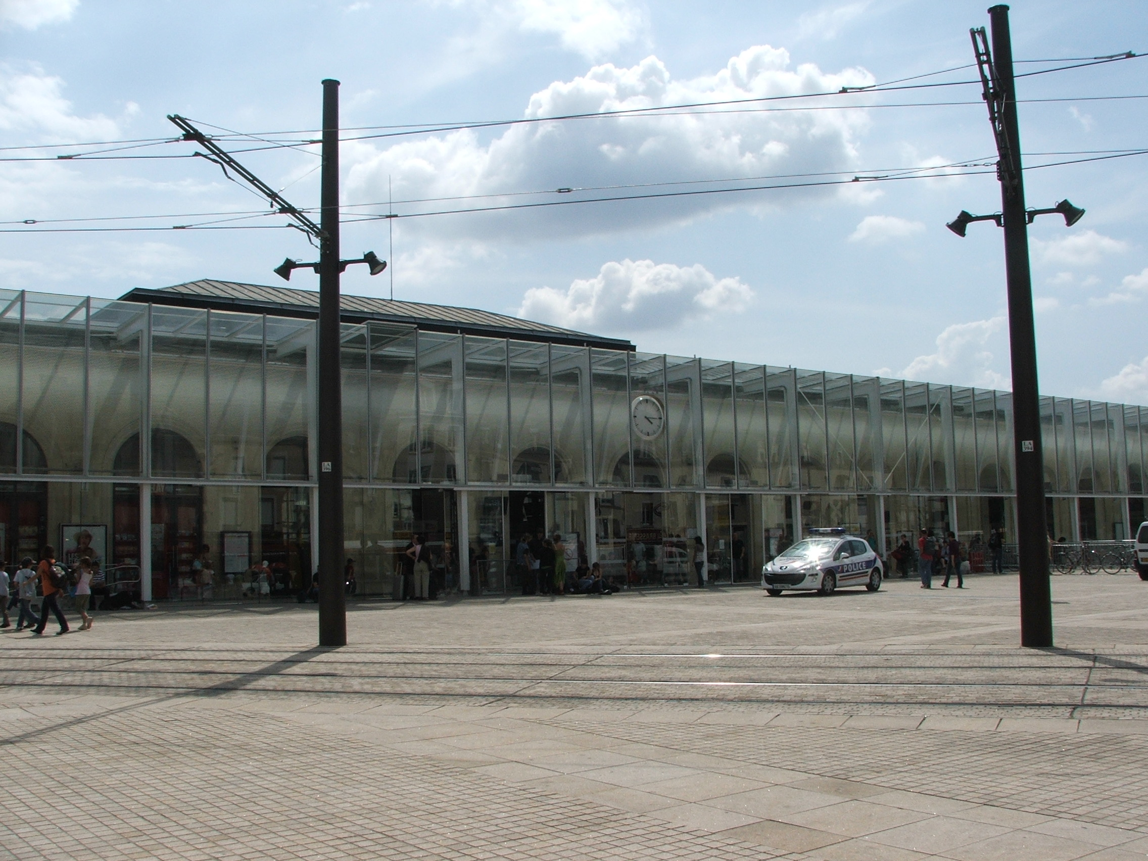 Vue sur la gare nord du Mans depuis l'avenue du Général Leclerc.